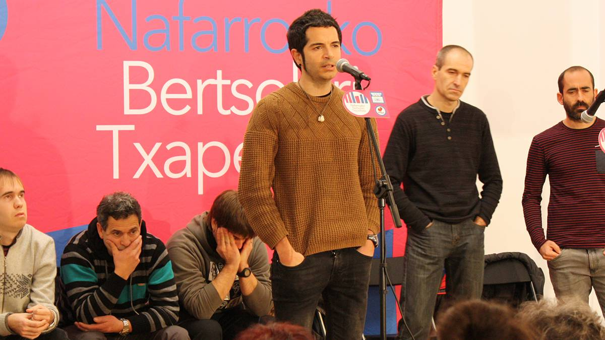 Jon Barberena bertsolari Nafarroako txapelketan kantari (arg.: erran.eus)